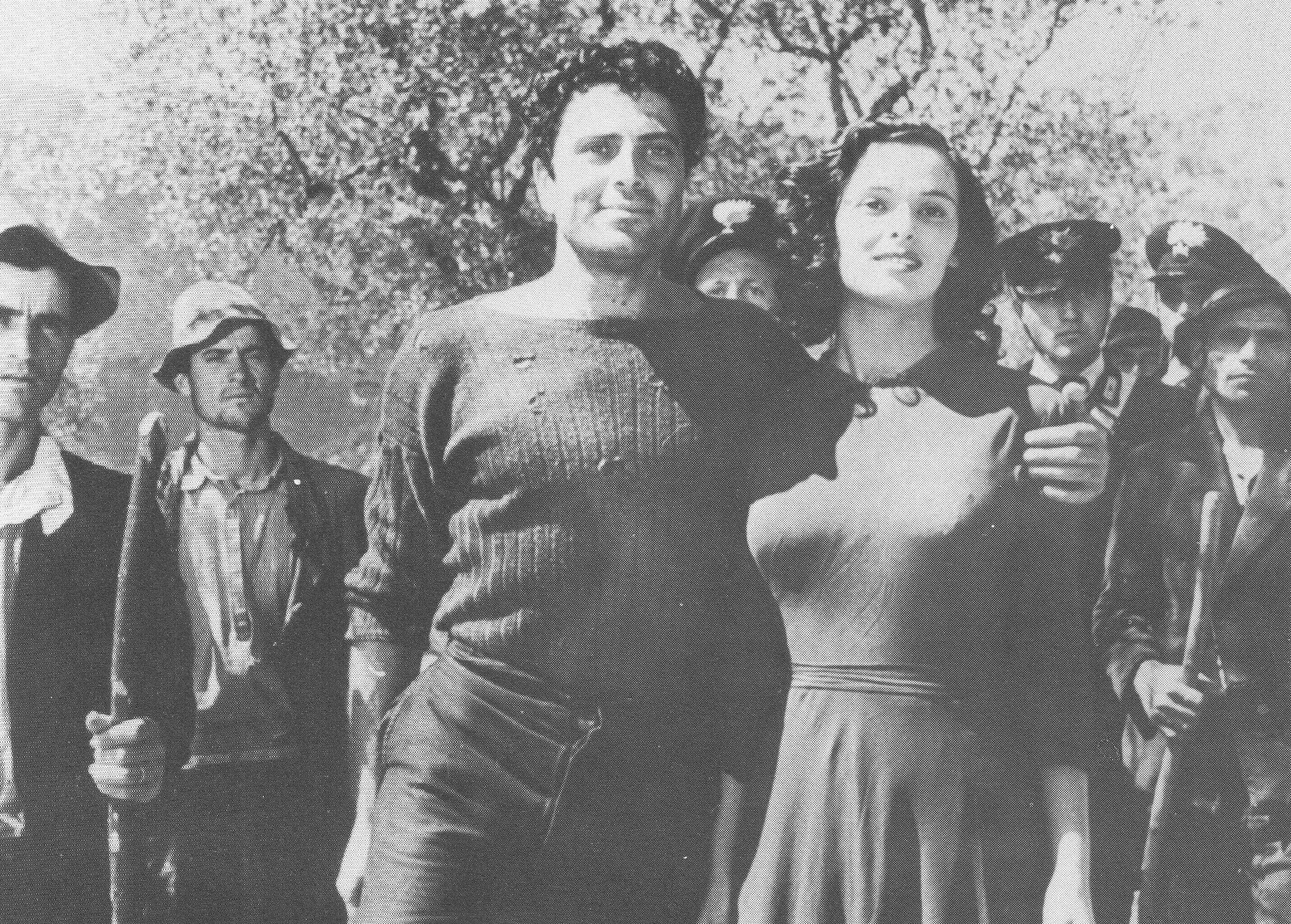 Immagine dal film Non c'è pace tra gli ulivi di Giuseppe De Santis (1950)